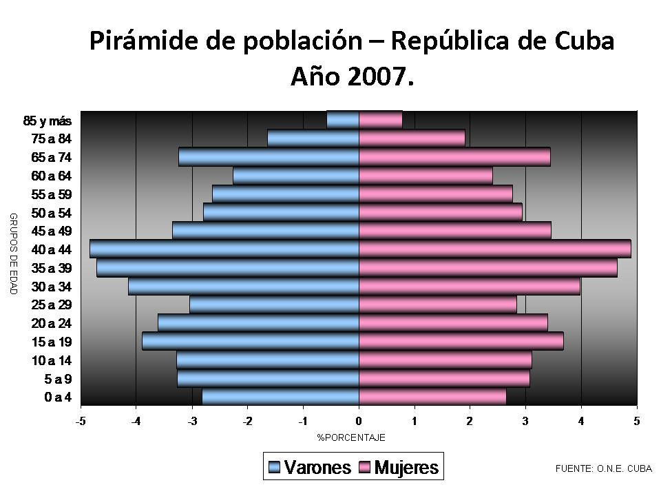 Piramide de poblacion de Cuba. 2007 Fuente: Oficina Nacional de Estadisticas de Cuba (cuadro 3.3 .excel)